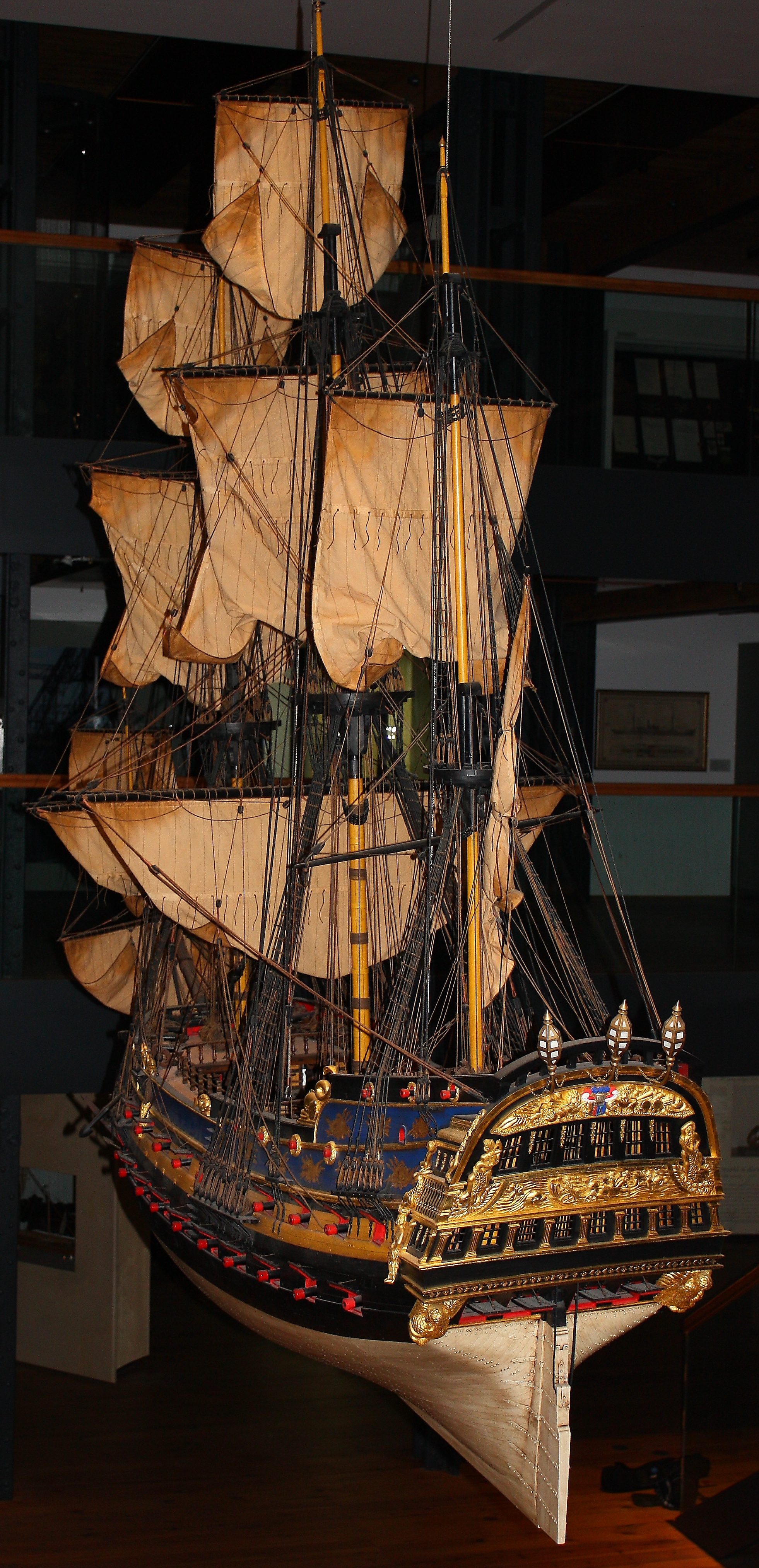 Totale Heckansicht des Konvoischiffes Wapen von Hamburg (III)